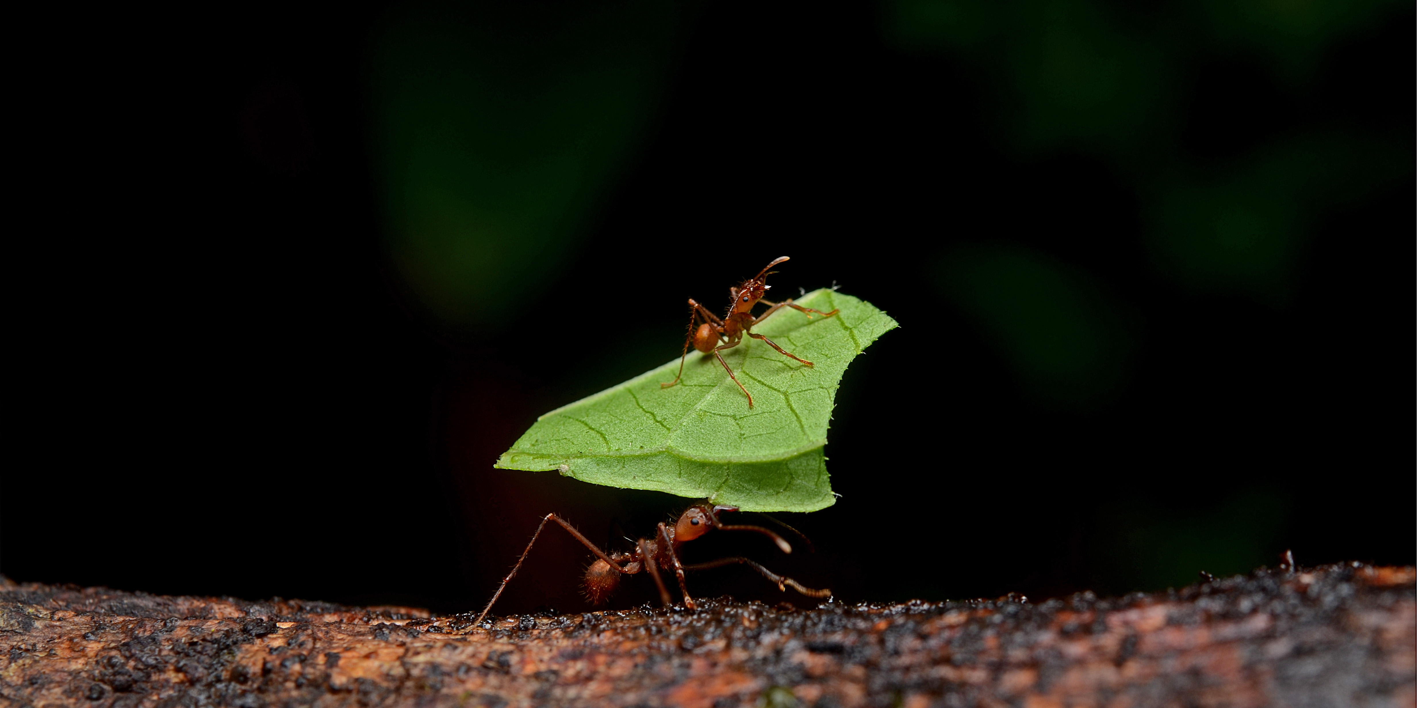 Formicidae seen at La Selva Biological Station, Heredia, Costa Rica